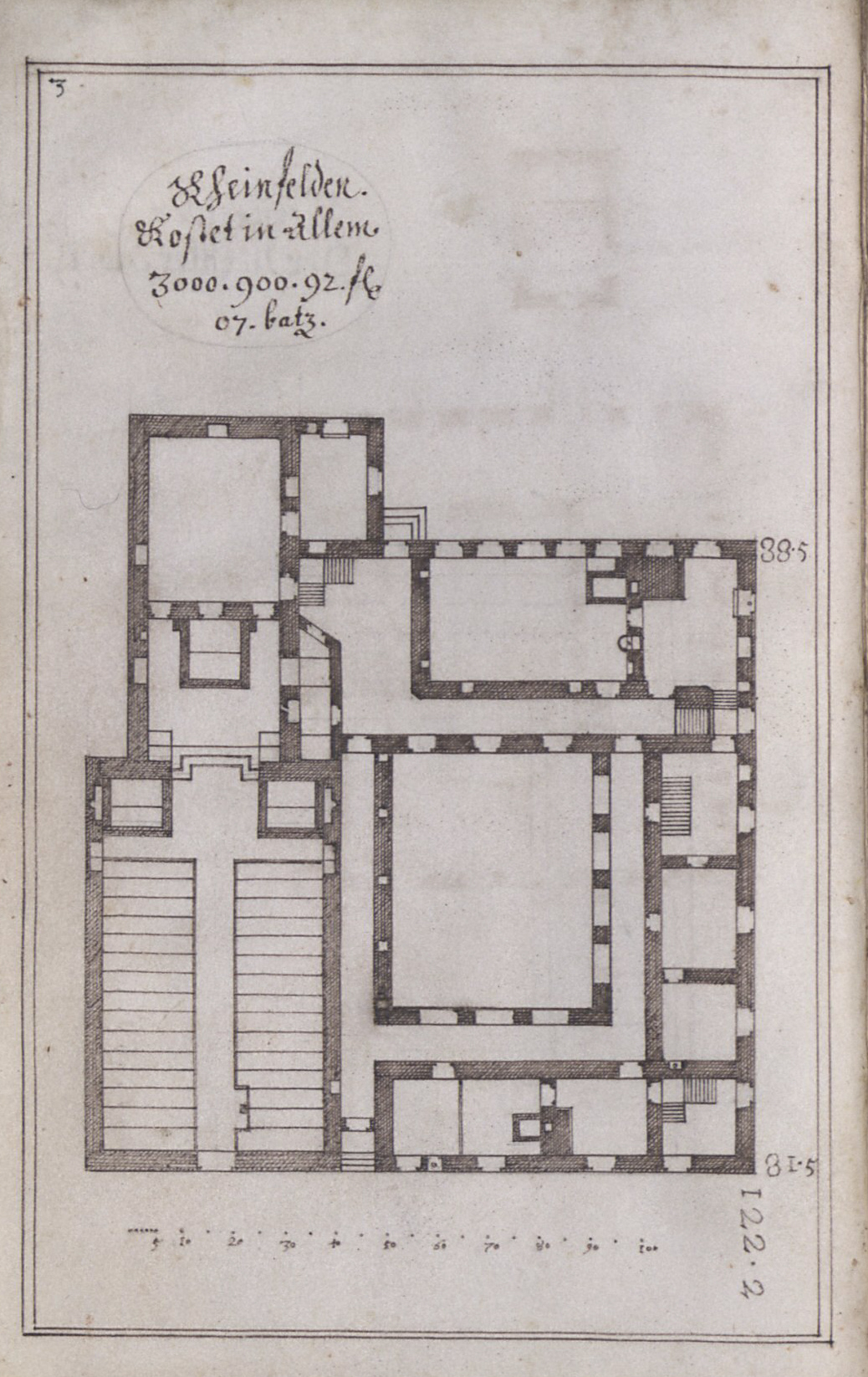 Architectura Capucinorum, Handschrift, 17. Jh., Württembergische Landesbibliothek, Cod. Don. 879, fol. 3v, Rheinfelden/Aargau